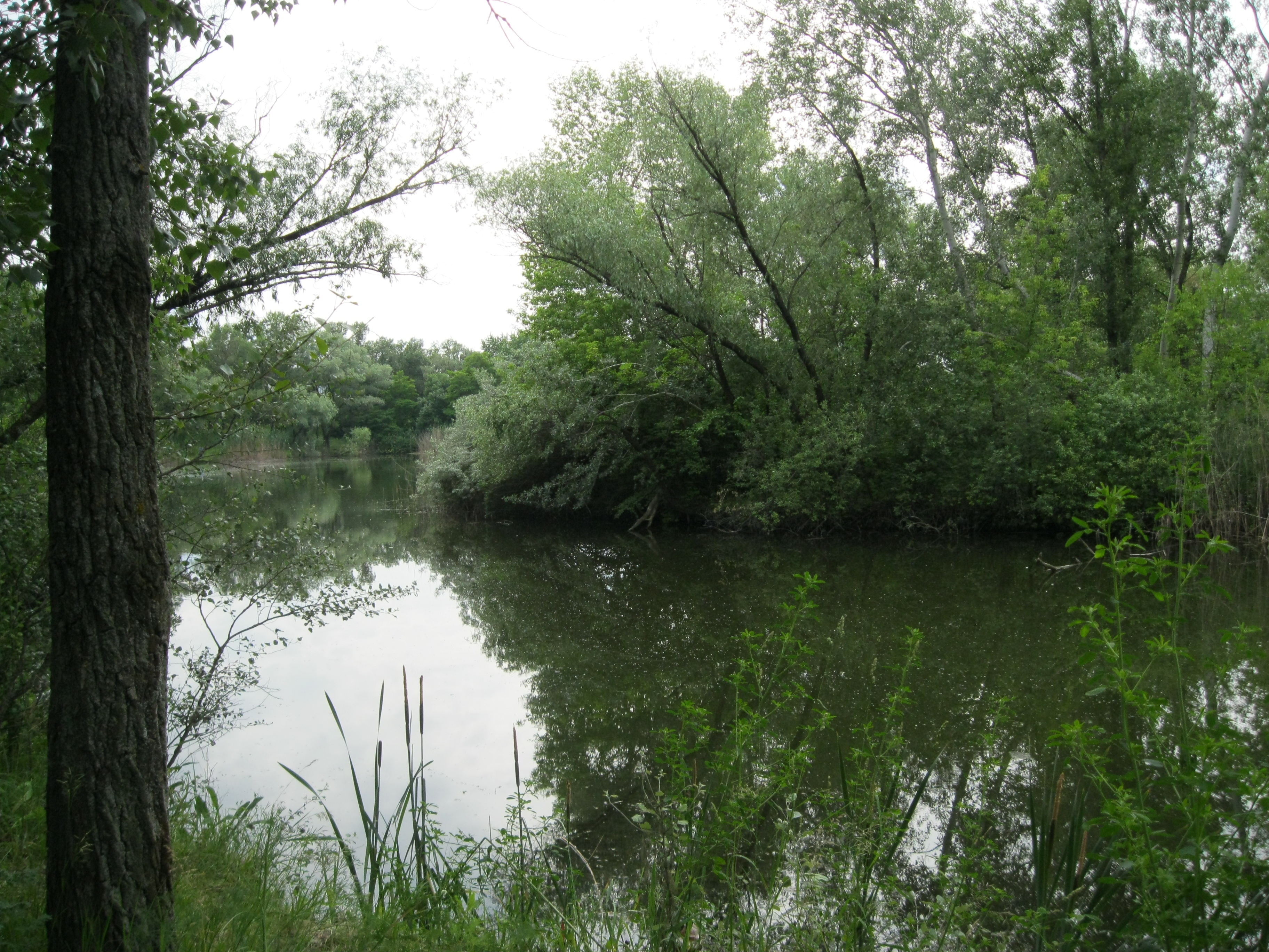 Острів на озері у Студентському парку